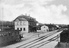 Bahnhof Lechbruck a. See auf einer im Januar 1909 versandten Postkarte